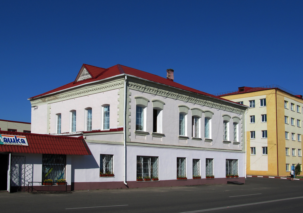 Мсціслаў. Заезны дом селяніна